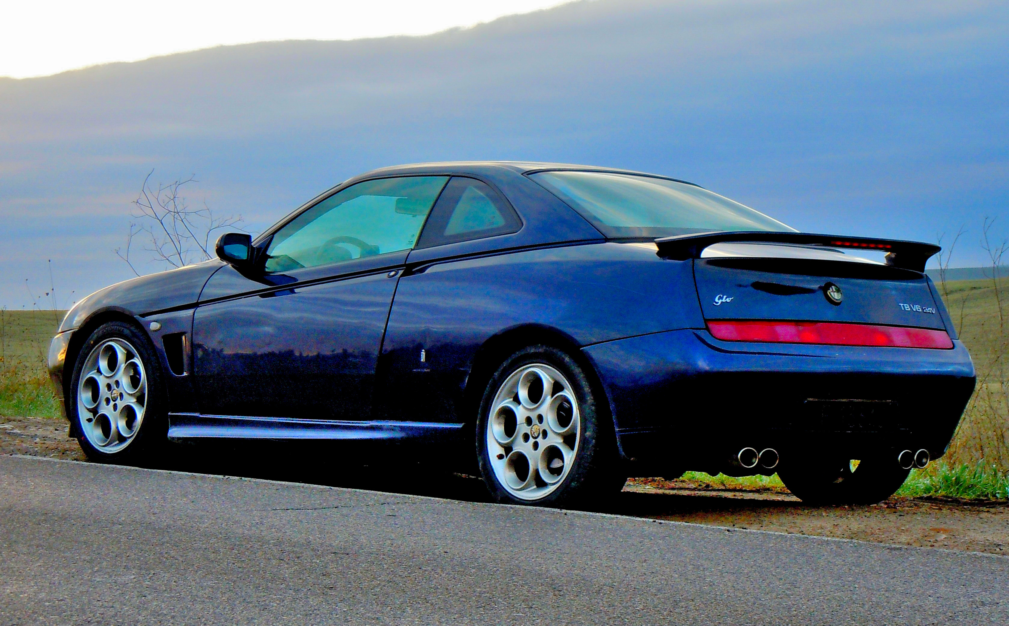 Gtv V6 Turbo (seconda serie) con kit aerodinamico completo